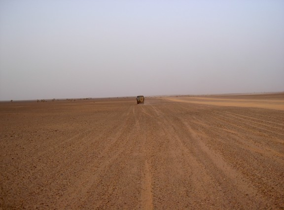 De Tindouf a Tifariti Sahara Occidental, trayecto de los campamentos de Tinduf hacia Tifariti.